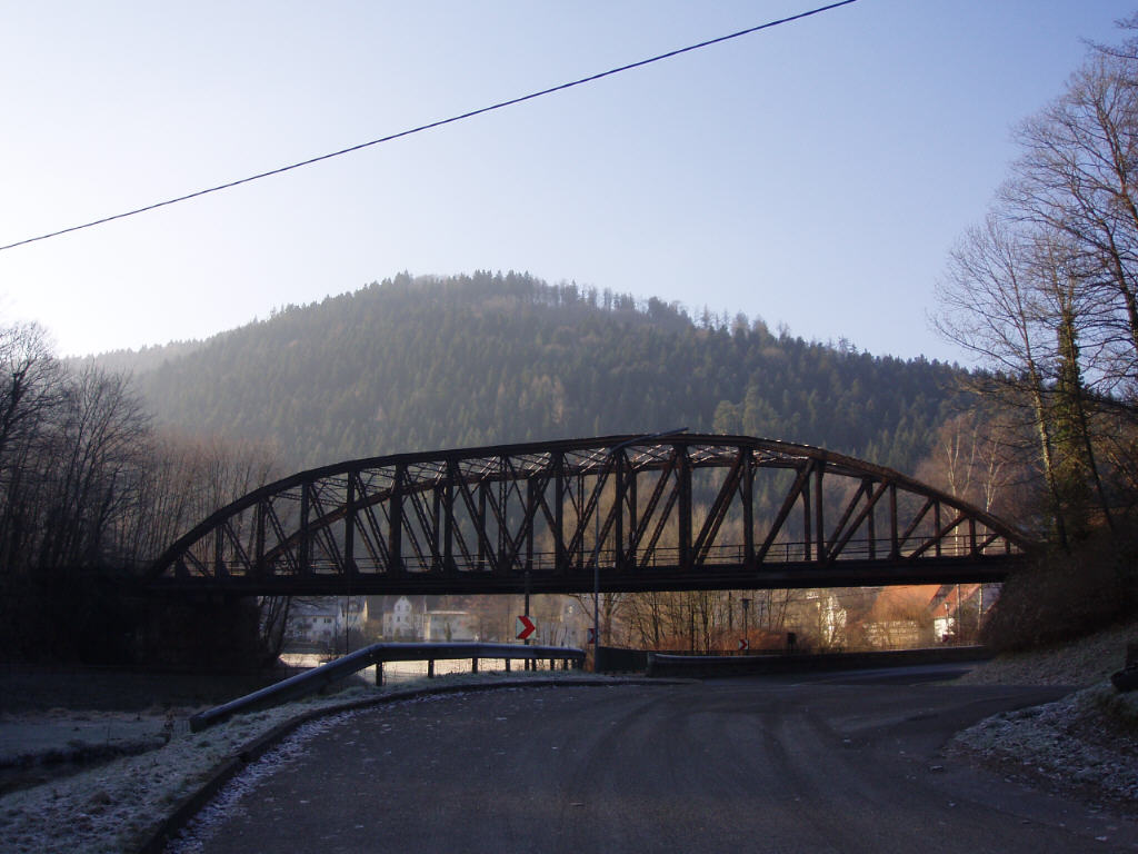 Bahnbrücke in Unterreichenbach